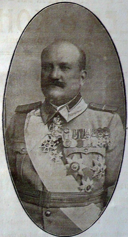 Generalul Gheorghe Văleanu comandant de corp de armată în Primul Război Mondial